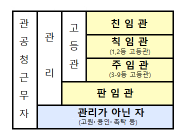 일본제국관료제